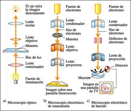 Descripción de los tipos de microscopios